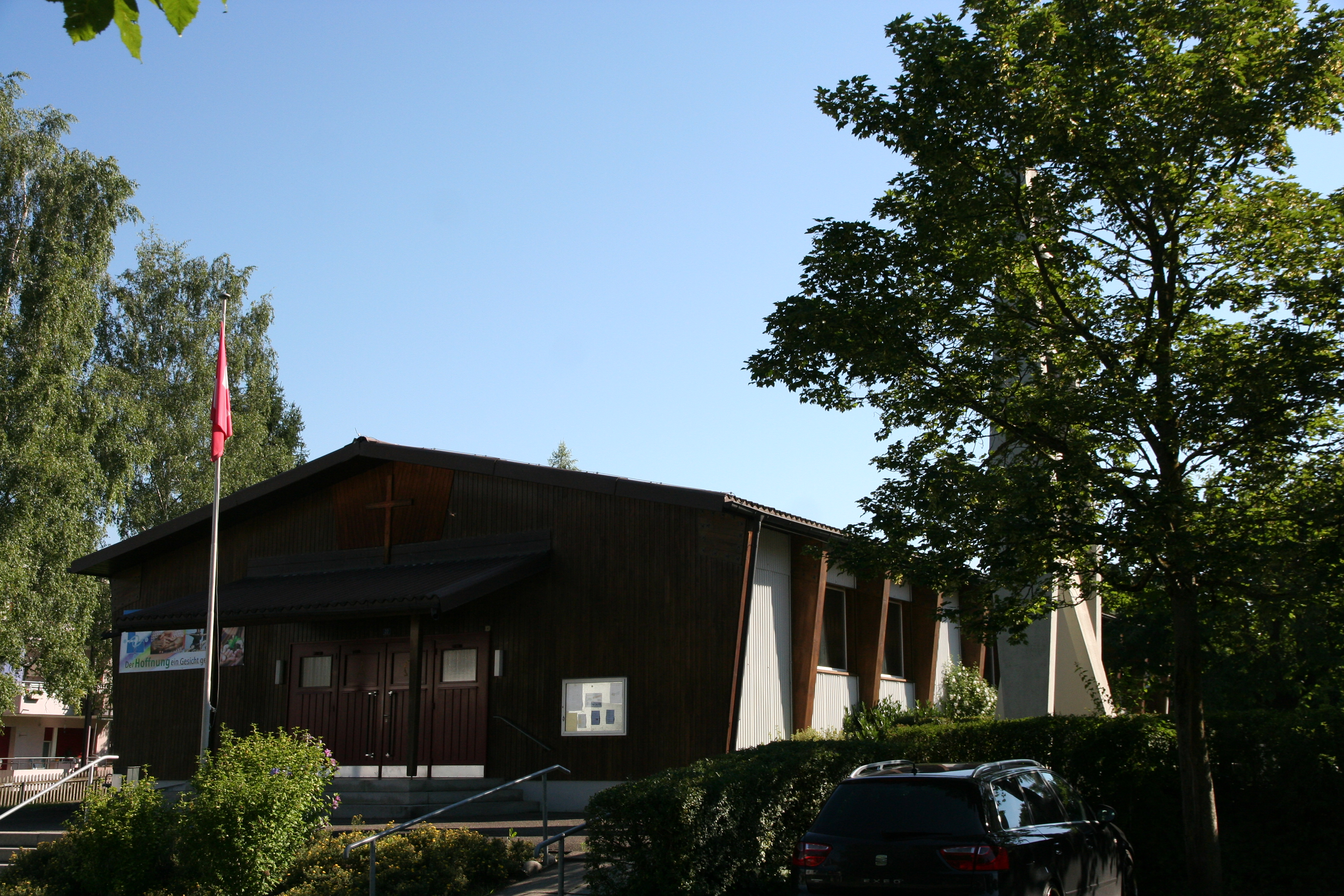 Römisch-katholische Kirche St. Antonius Obfelden, Aussenansicht